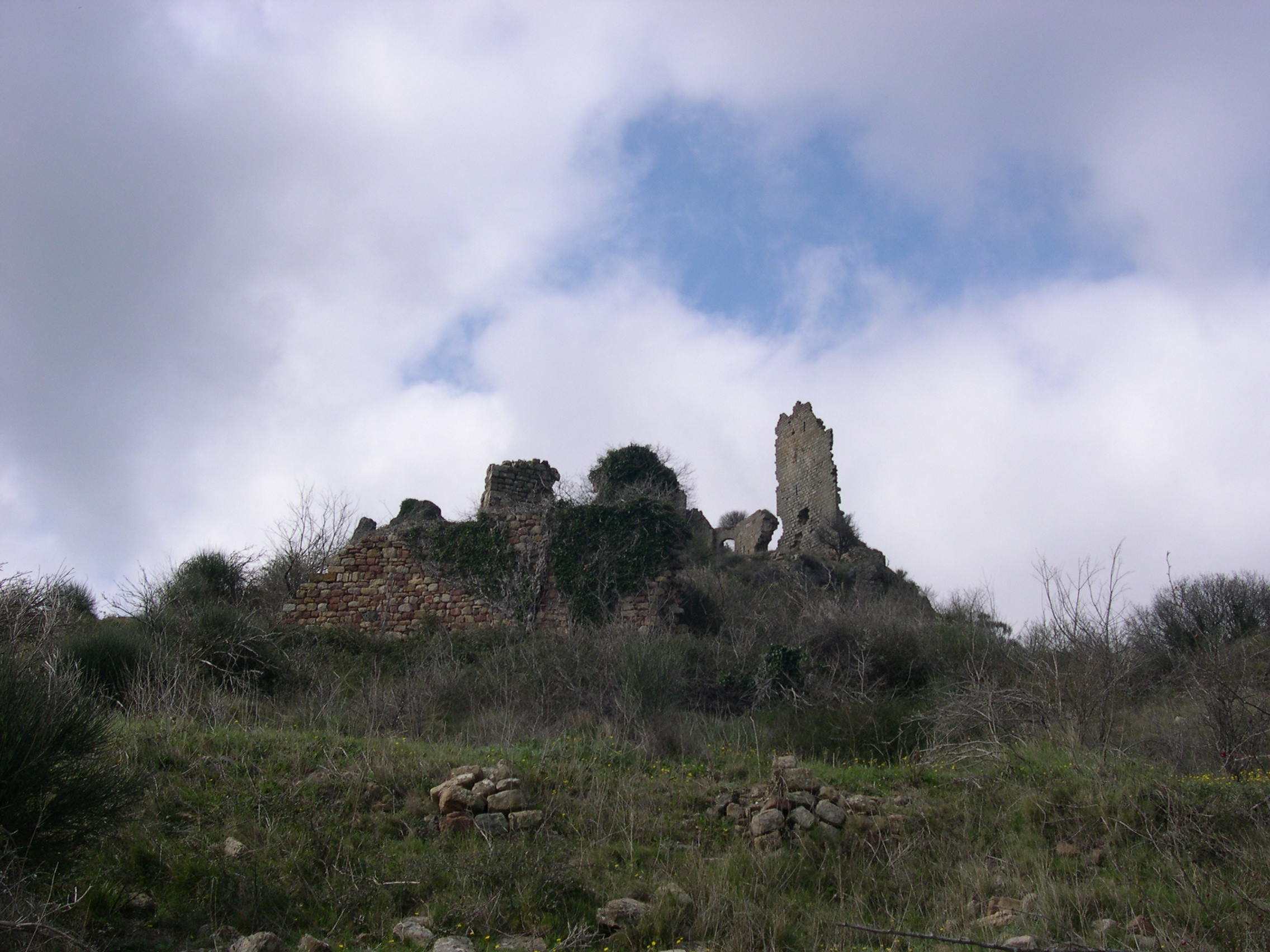 Mérifons - Château de Malavieille